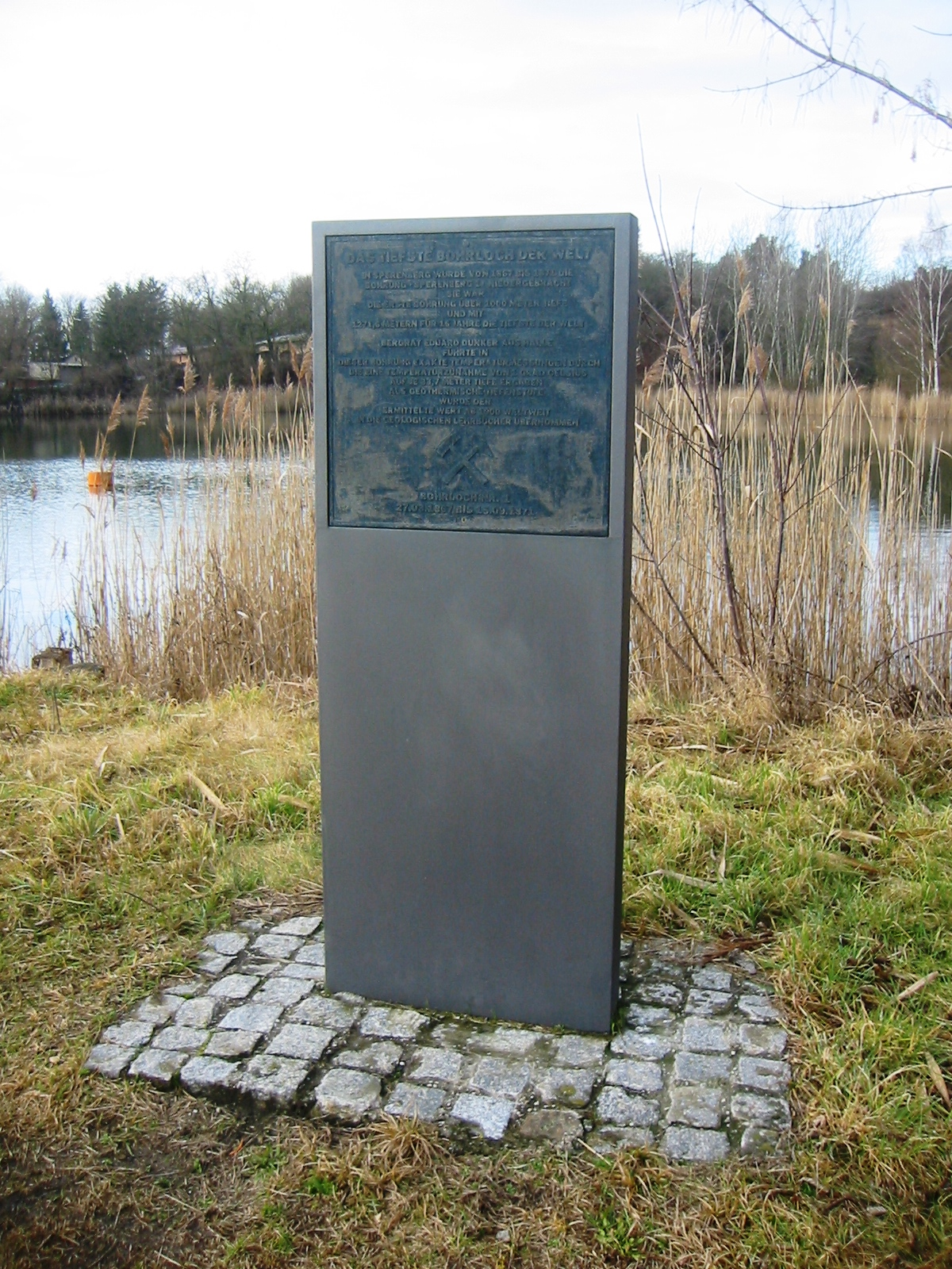 Erinnerungsstele an die "Bohrung Nr. 1", die weltweit erste Tiefbohrung mit 1.271,60m, die von 1867 bis 1781 abgeteuft wurde. Sie steht am „Gipsbruch 2“ in der Nähe des Gipsberges, einer 79,8 Meter hohen Erhebung in Sperenberg, Am Mellensee (Brandenburg)